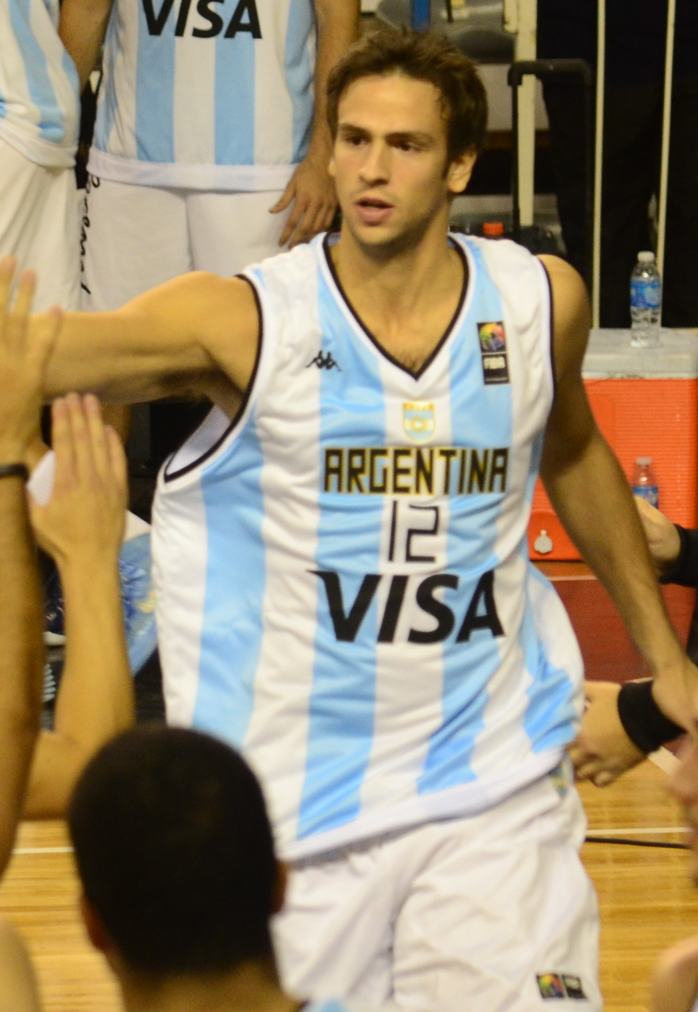 Marcos Delía